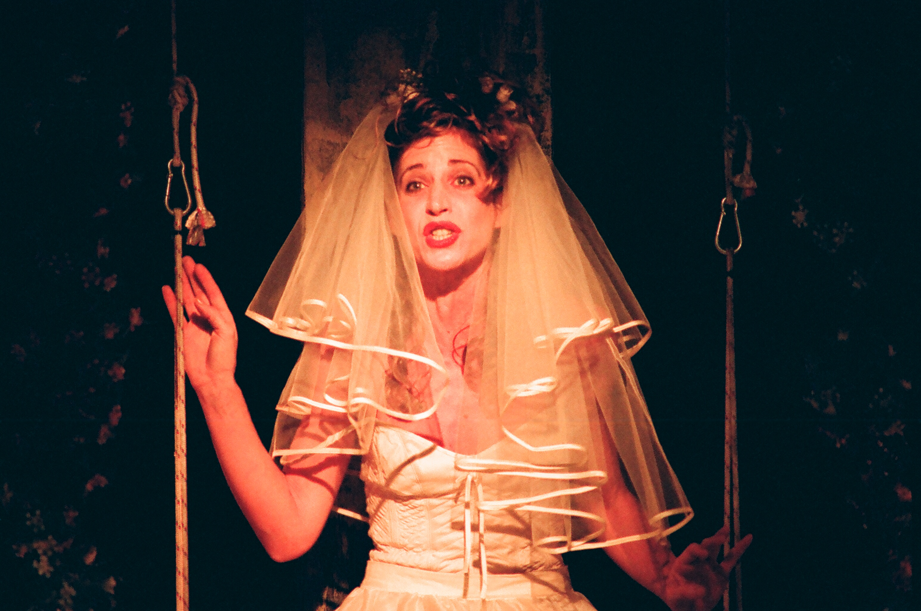 הגבול והשיבה 1